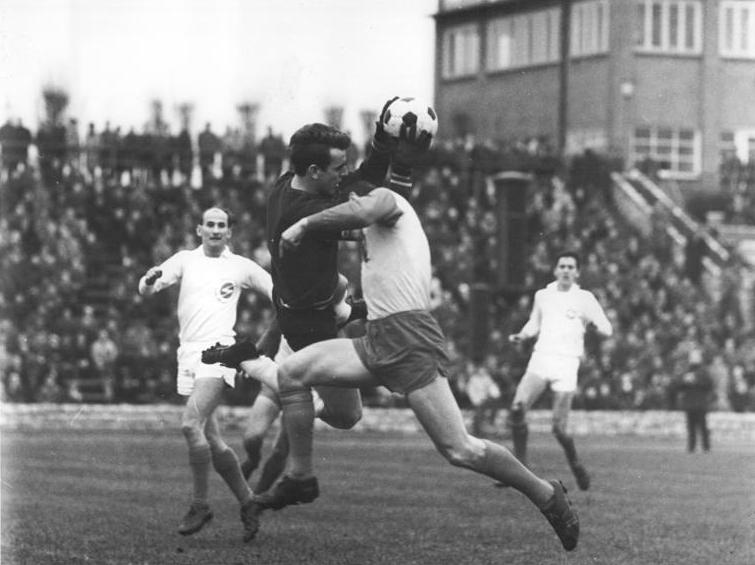 Zentralbild-Koard Sche-Qu 16.11.1966 Berlin: Fußball-Oberliga-Punktspiel FC Vorwärts Berlin - BSG Motor Zwickau - Vor 5.000 Zuschauern im Berliner Jahn-Sportpark kam der Deutsche Fußballmeister FC Vorwärts Berlin über ein 1:1 Unentschieden nicht hinaus. Torwart Jürgen Croy (Mitte) stand of im Brennpunkt des Geschehens. Hier wird er von Jürgen Großheim (FC Vorwärts, rechts) attackiert. Albert Beier (Motor Zwickau, links) kann nicht mehr eingreifen.